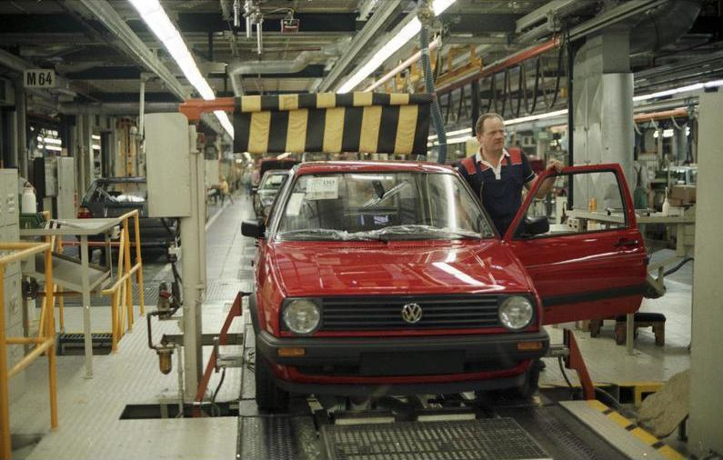 Juni 1988 Wolfsburg, Volkswagenwerk, computergesteuerte Qaulitätskontrolle